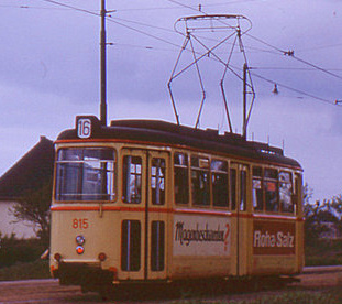 Straßenbahn Bremen, Wagen Nr. 815 am Sonntag, den 18. Mai 1963 auf der Linie 16 am Riensberg